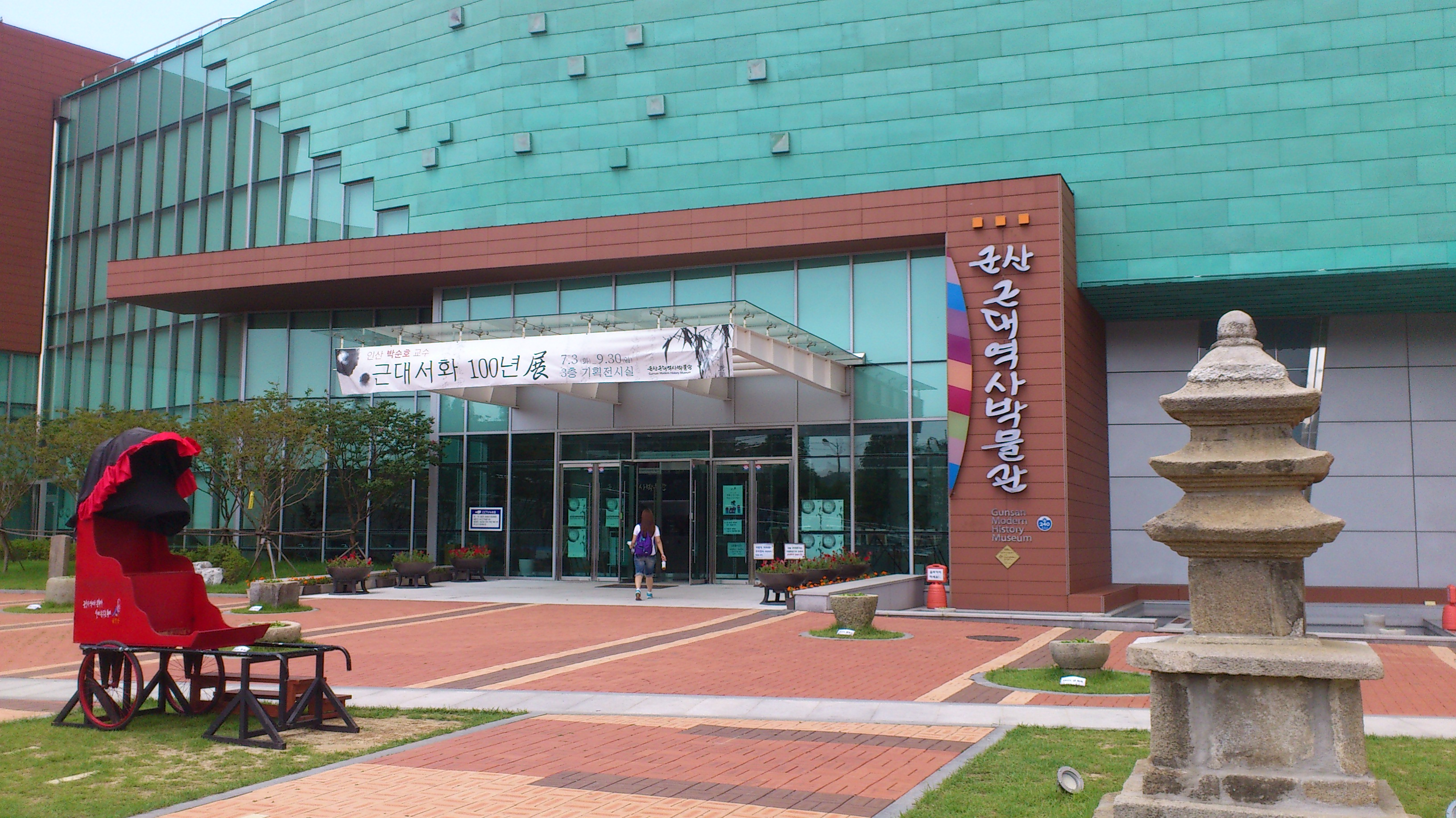 群山近代史博物館入口。